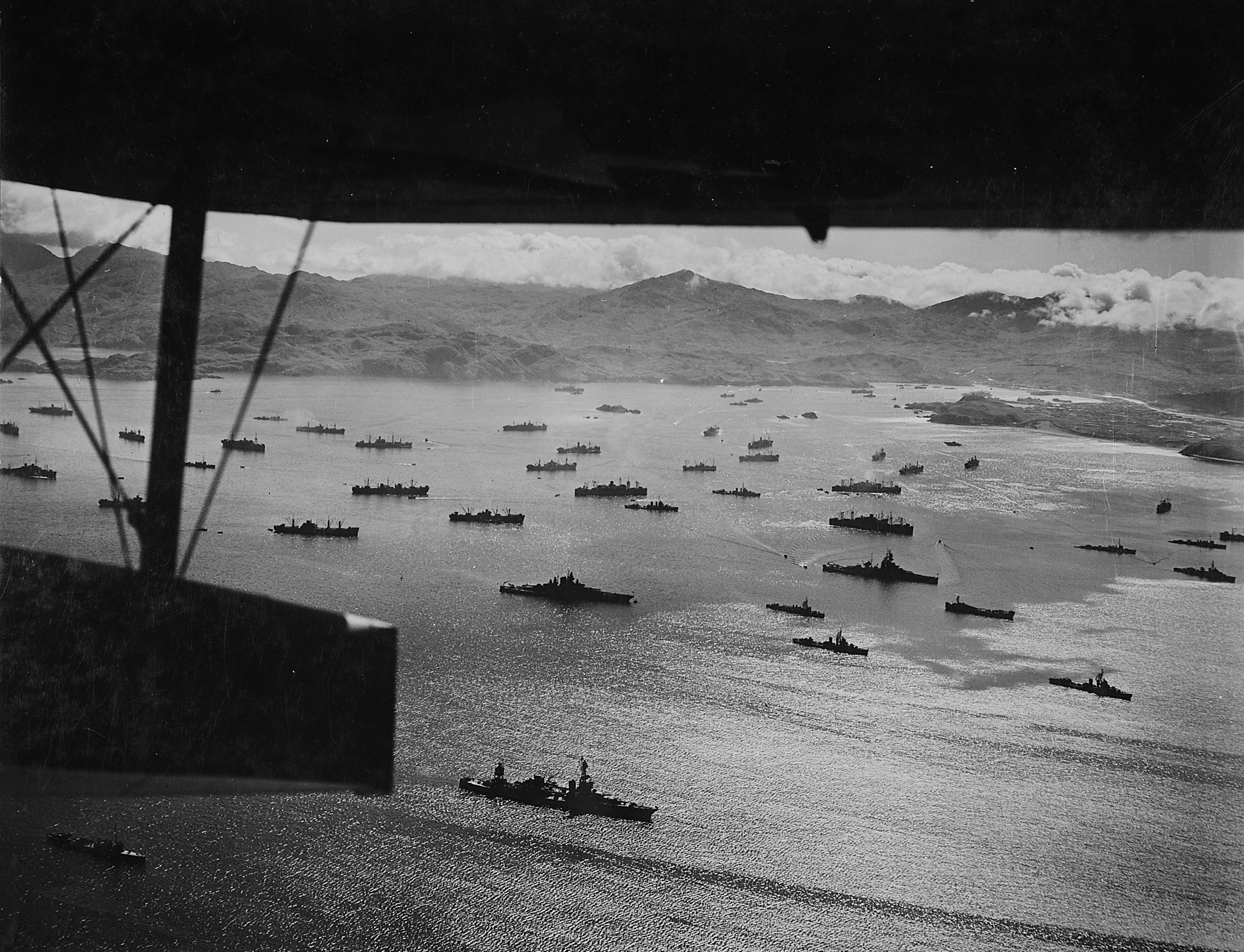 The Kiska invasion fleet at Adak harbor, Aleutians, Alaska (USA), in August 1943.